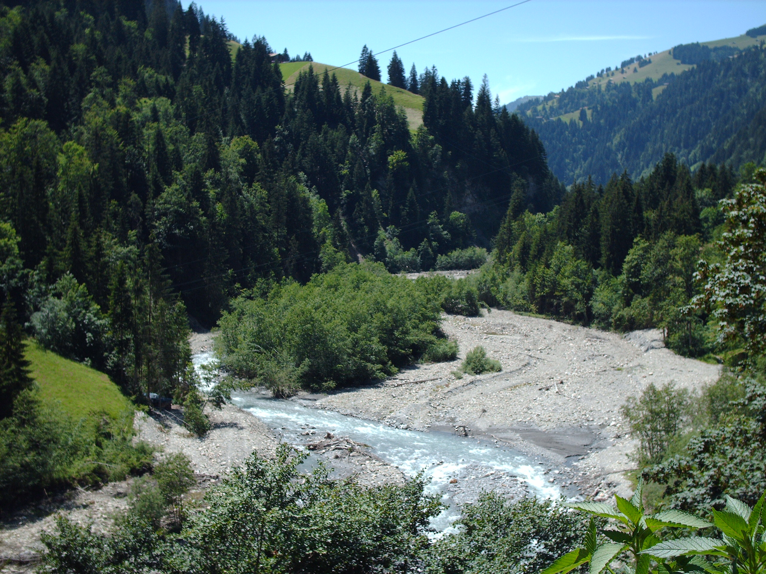 Auenlandschaft an der Engstlige ob Frutigen, Auengebiet von nationaler Bedeutung